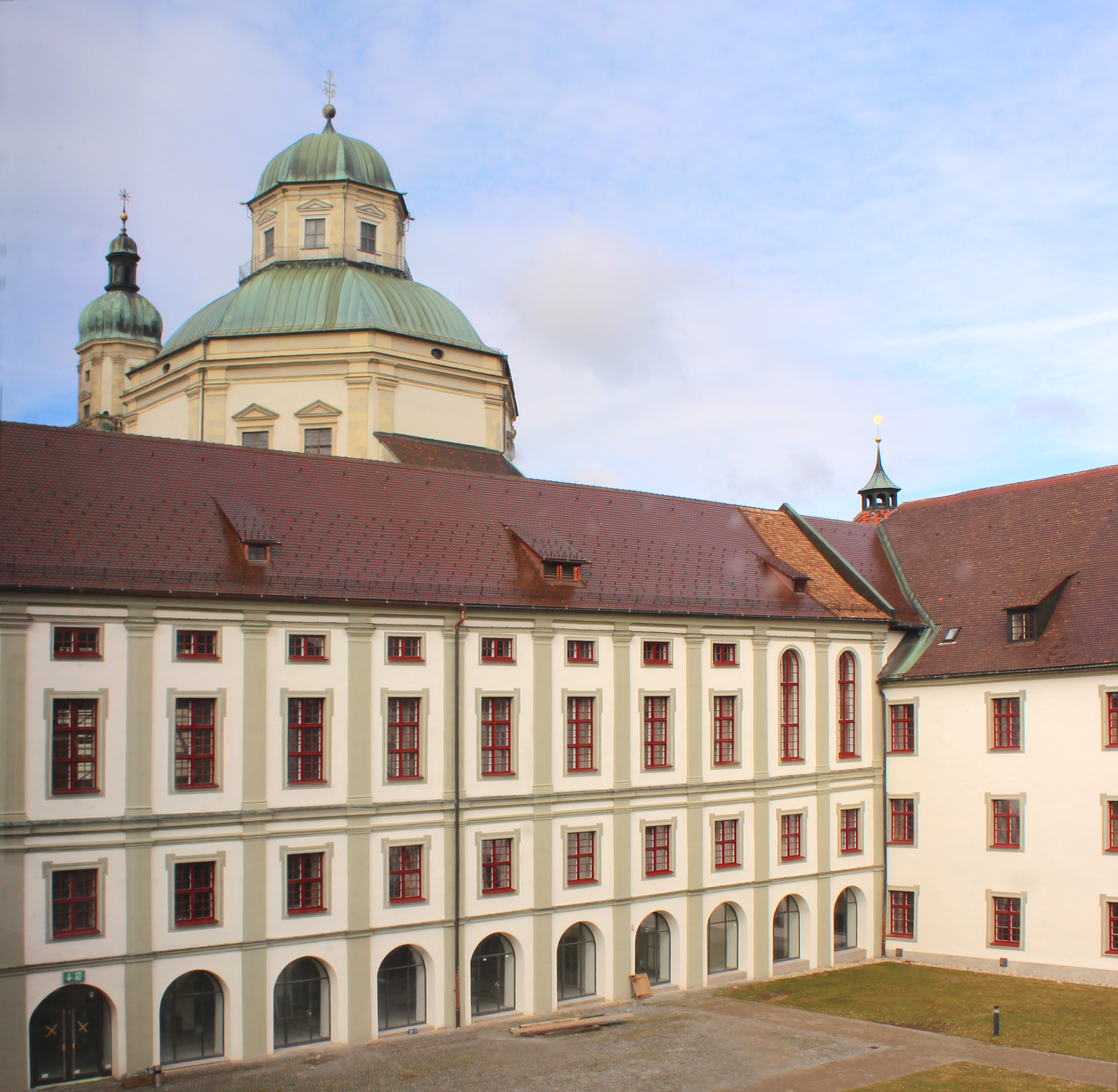 Residenz Kempten, näheres siehe Dateiname